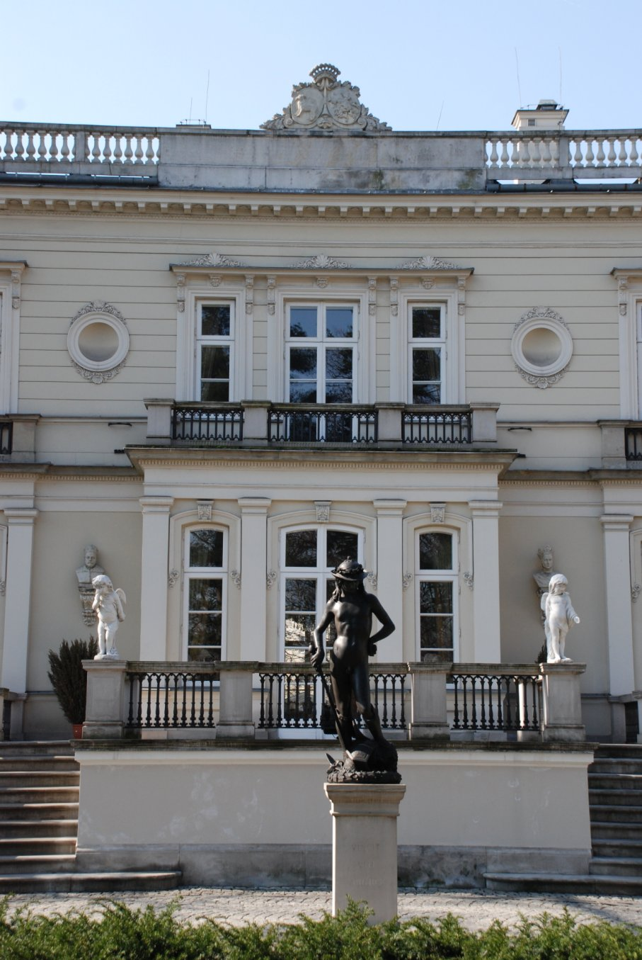 Pałac Sobańskich przy Alejach Ujazdowskich 13 w Warszawie (fot Zu) .